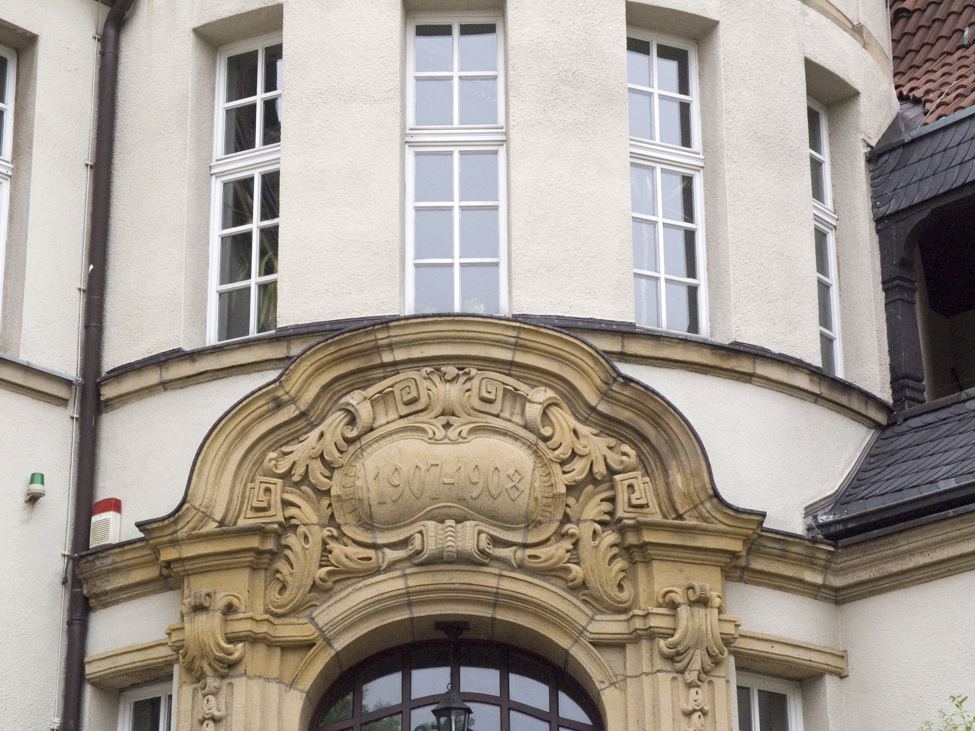 Северный Рейн - Вестфалия, Эссен – ратуша района Край